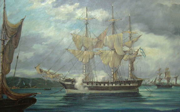 La fragata Heroína en Puerto Soledad, obra de E. Biggeri